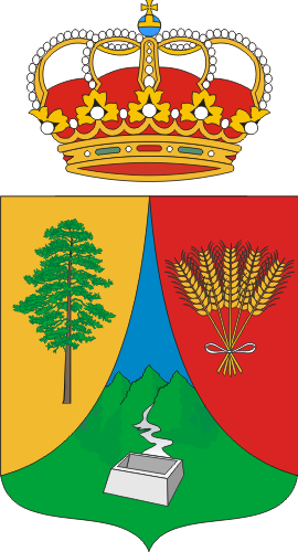 Escudo de El Tanque (Tenerife)